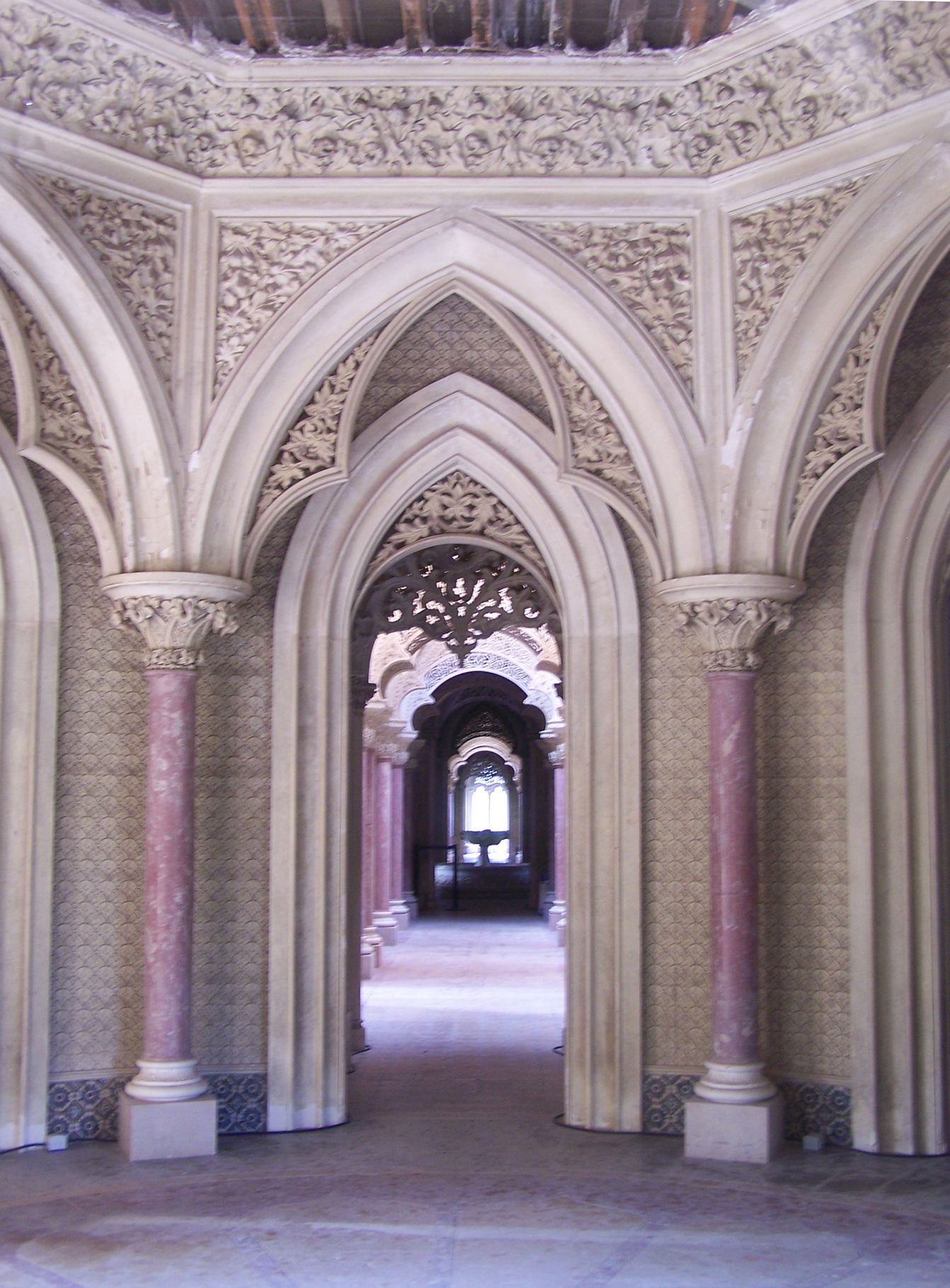 Interior do Palácio de Monserrate. Sintra, Portugal.